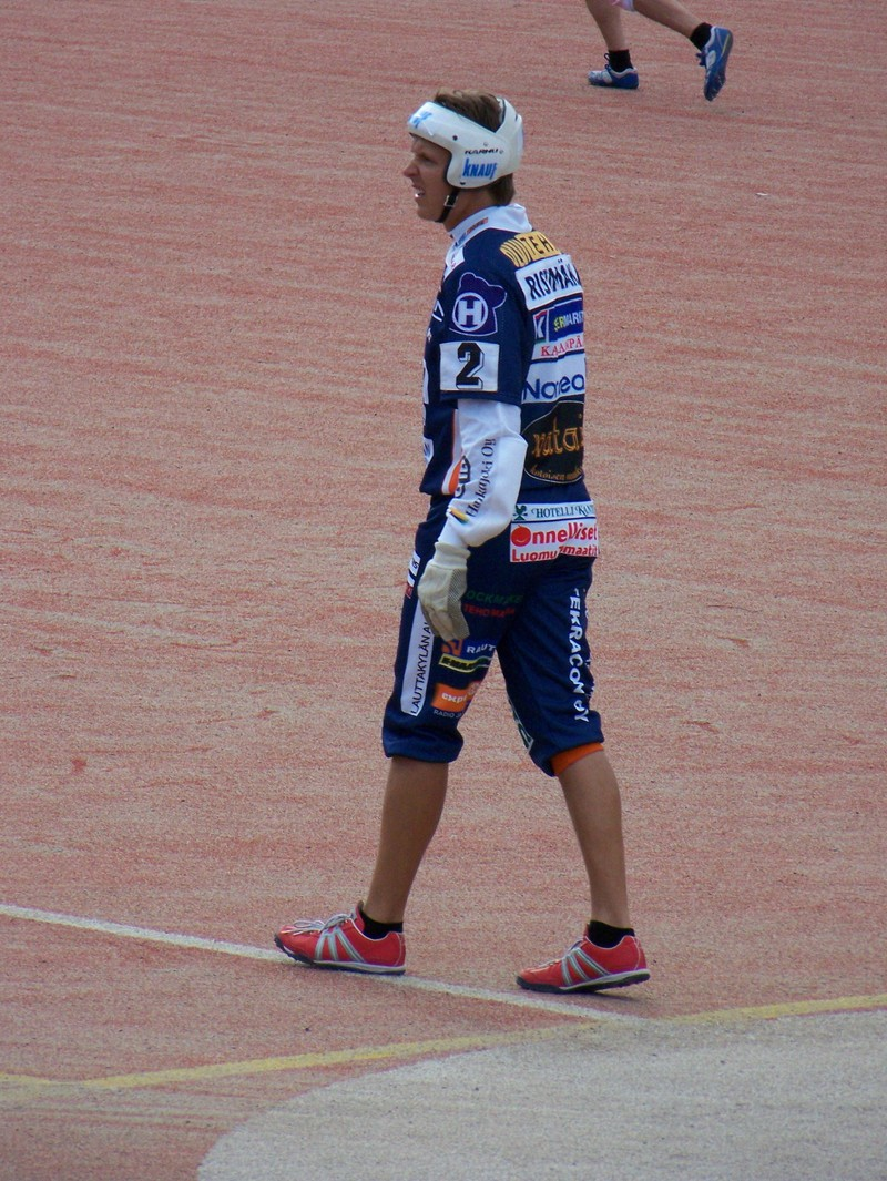 Jukka Ristimäki kakkospesällä kesällä 2007 ottelussa Manse PP - KaMa